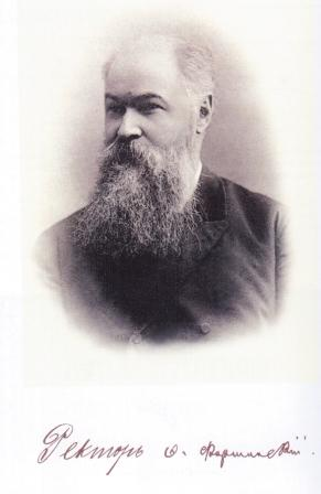 Федор Яковлевич Фортинский (1846—1902) — российский историк-медиевист, доктор общей истории (с 1877), заслуженный ординарный профессор (с 1897), декан историко-филологического факультета (1887—1890), ректор (1890—1902) Киевского университета Св. Владимира